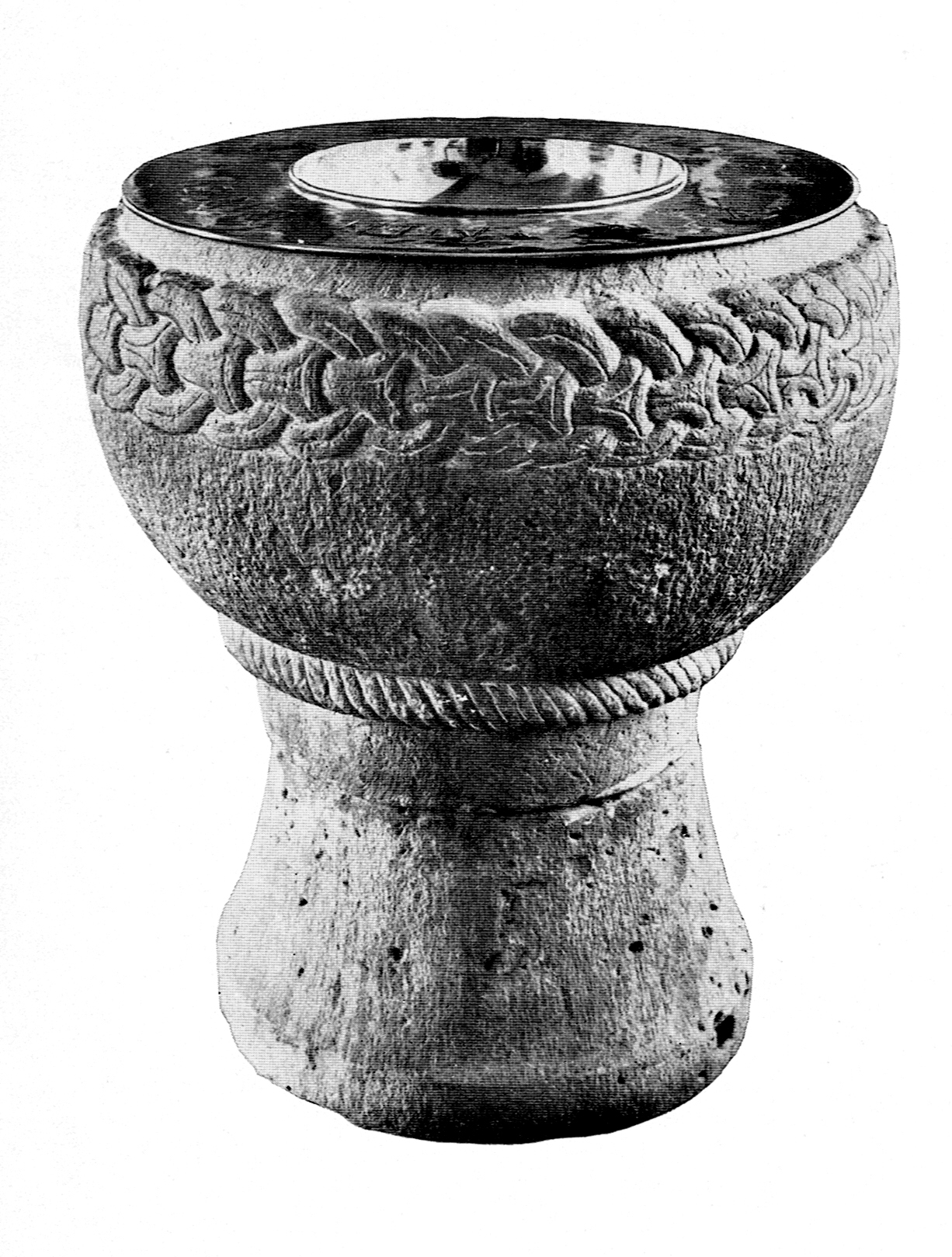 Västerlanda kyrka. Dopfunt